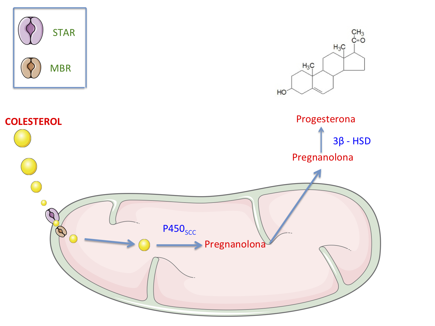 Representació gràfica del procés de síntesis de la pregnanolona a partir del colesterol